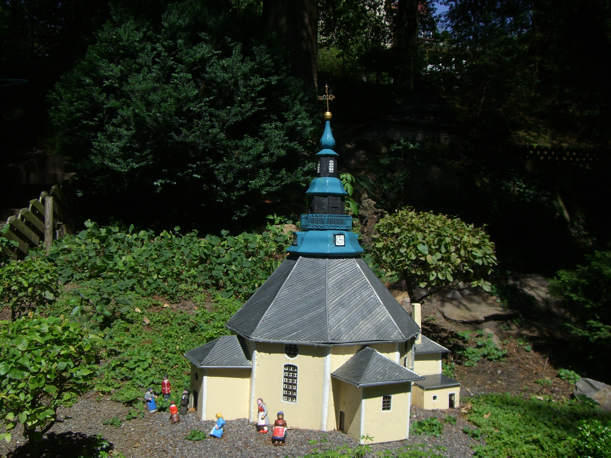 Modell der Seiffener Kirche im Klein-Erzgebirge in Oederan, Sachsen